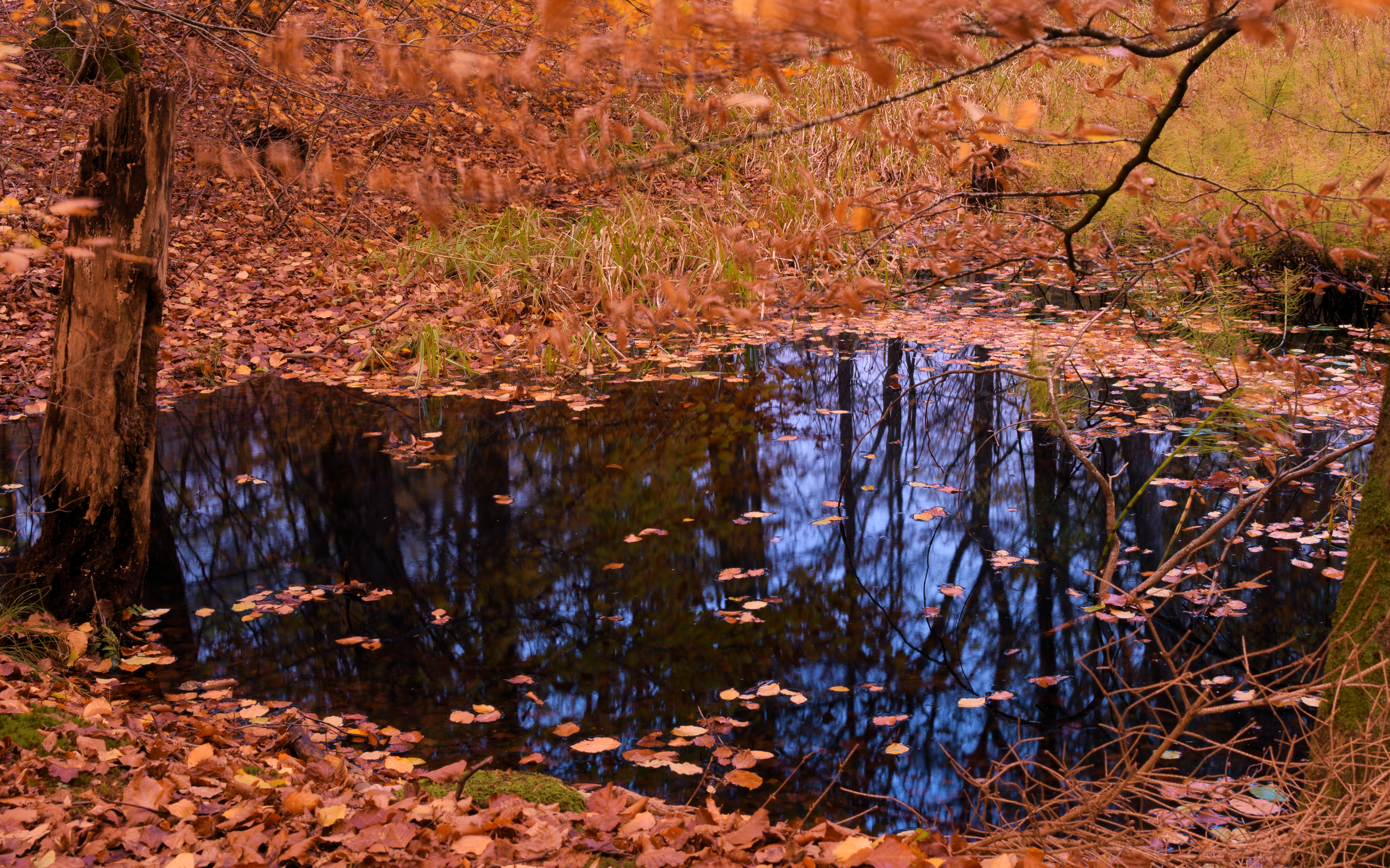 Frostavallens strovomrade